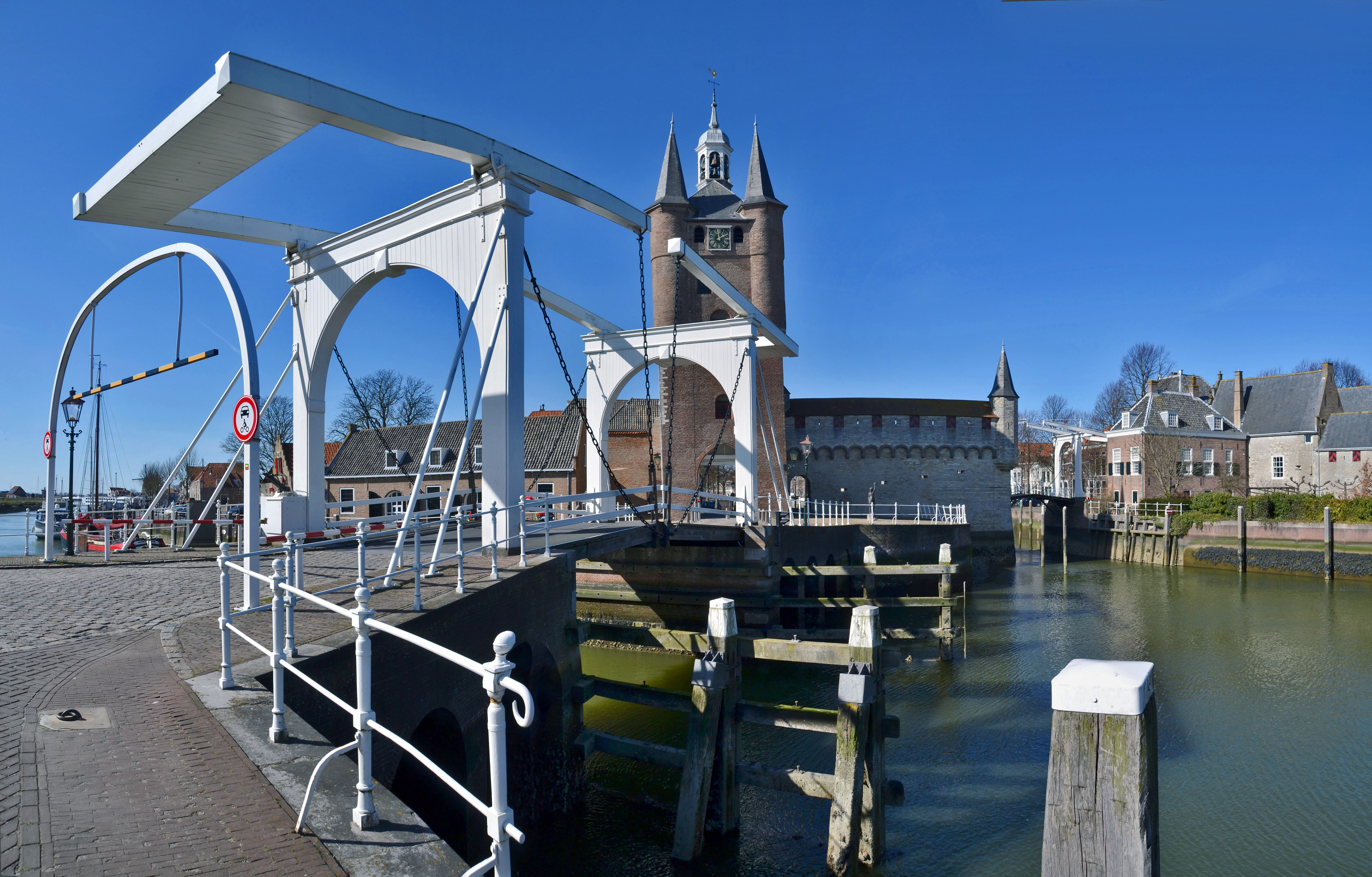 Zuidhavenport, Oude Haven